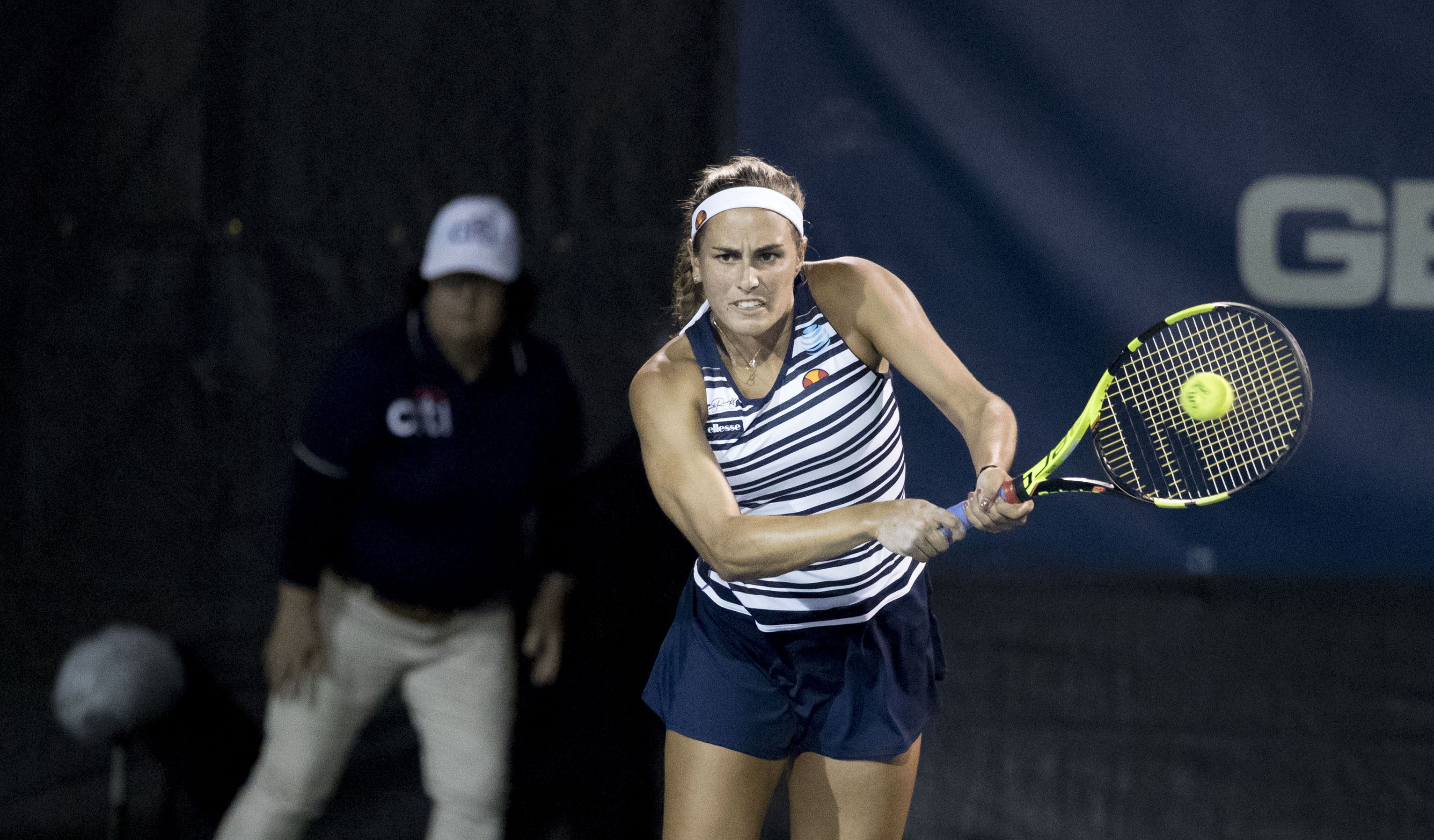 Citi Open Tennis 2017